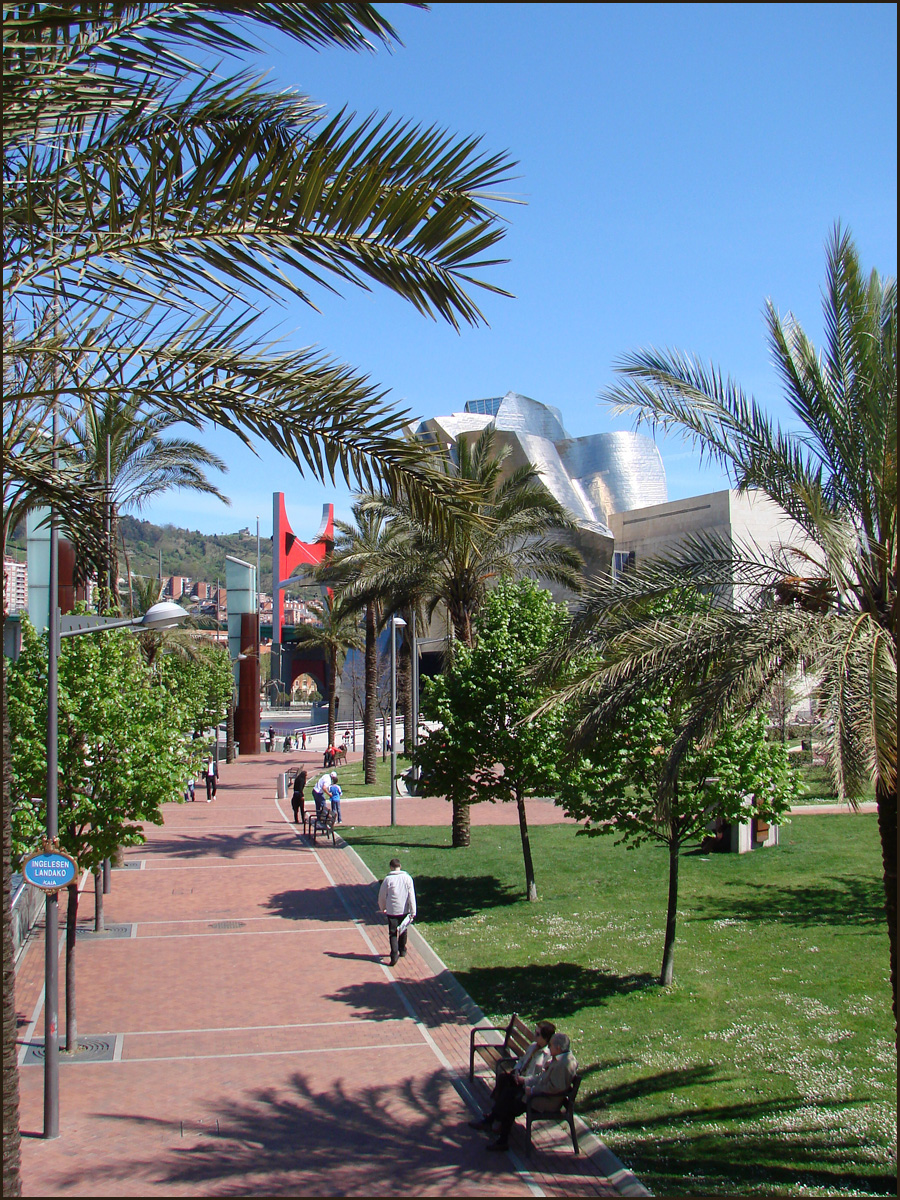 Promenade sur la rive gauche de la Ria de Bilbao près du musée Guggenheim.